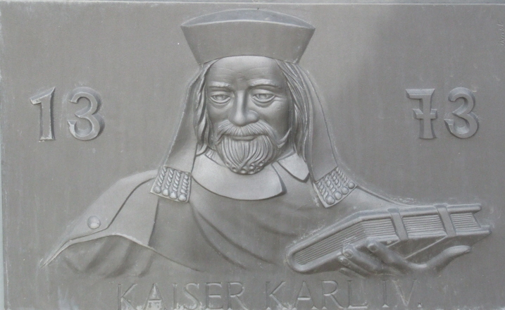 Tafel am Stadtbrunnen vor der St. Stephanskirche in Tangermünde von Karolin Donst, Motiv: Kaiser Karl IV.